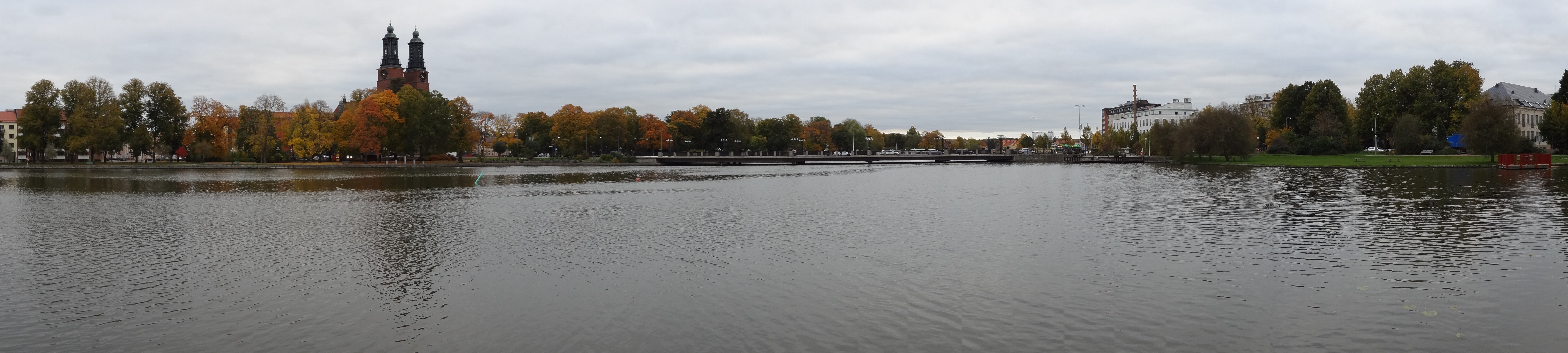 Panorama över Eskilstunaån. Till vänster Kloster kyrka, i mitten Nybron, till höger östra delen av Nybroparken.